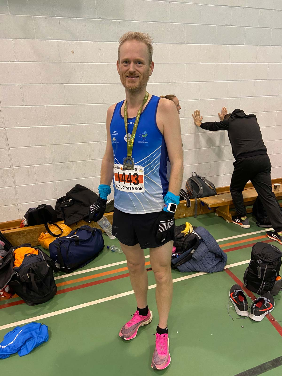 Bilde av Simen Holvik etter endt målgang ved ultraløpet Gloucester 50km januar 2020